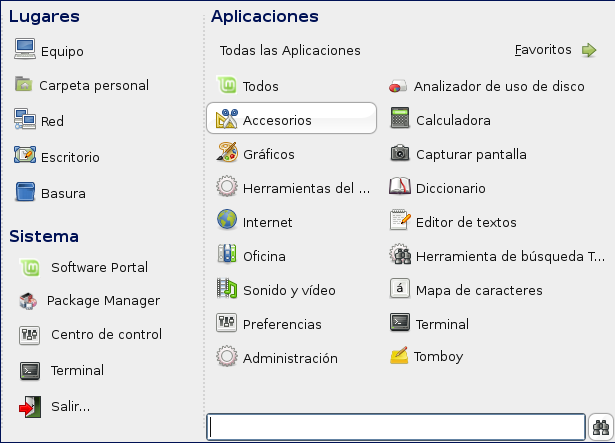 MintMenu 3.0